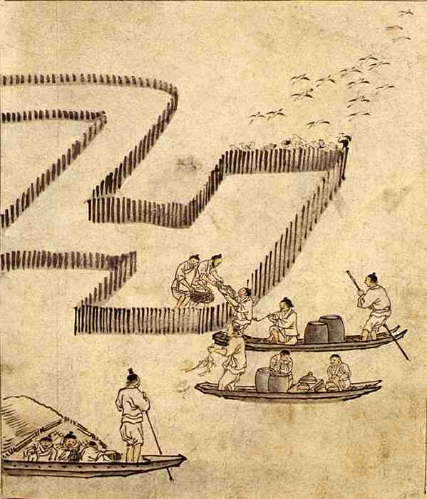 고기잡이(漁場), 단원풍속도첩(檀園風俗畵帖)에서 종이에담채, 27cm x 22.7cm, 국립 중앙박물관 소장